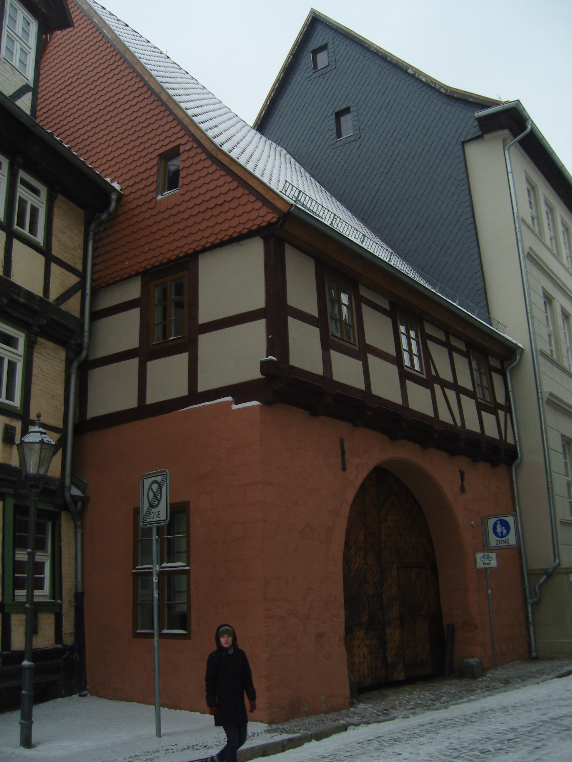 Denkmalgeschützter Marstall Pölle 32 in Quedlinburg